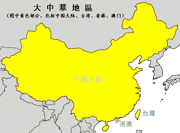 在zh::Image:Zhongguodalu.png基础上制作。